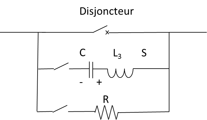 Schéma d'un disjoncteur HVDC à circuit oscillant, en usage dans de nombreuses stations HVDC de par le monde